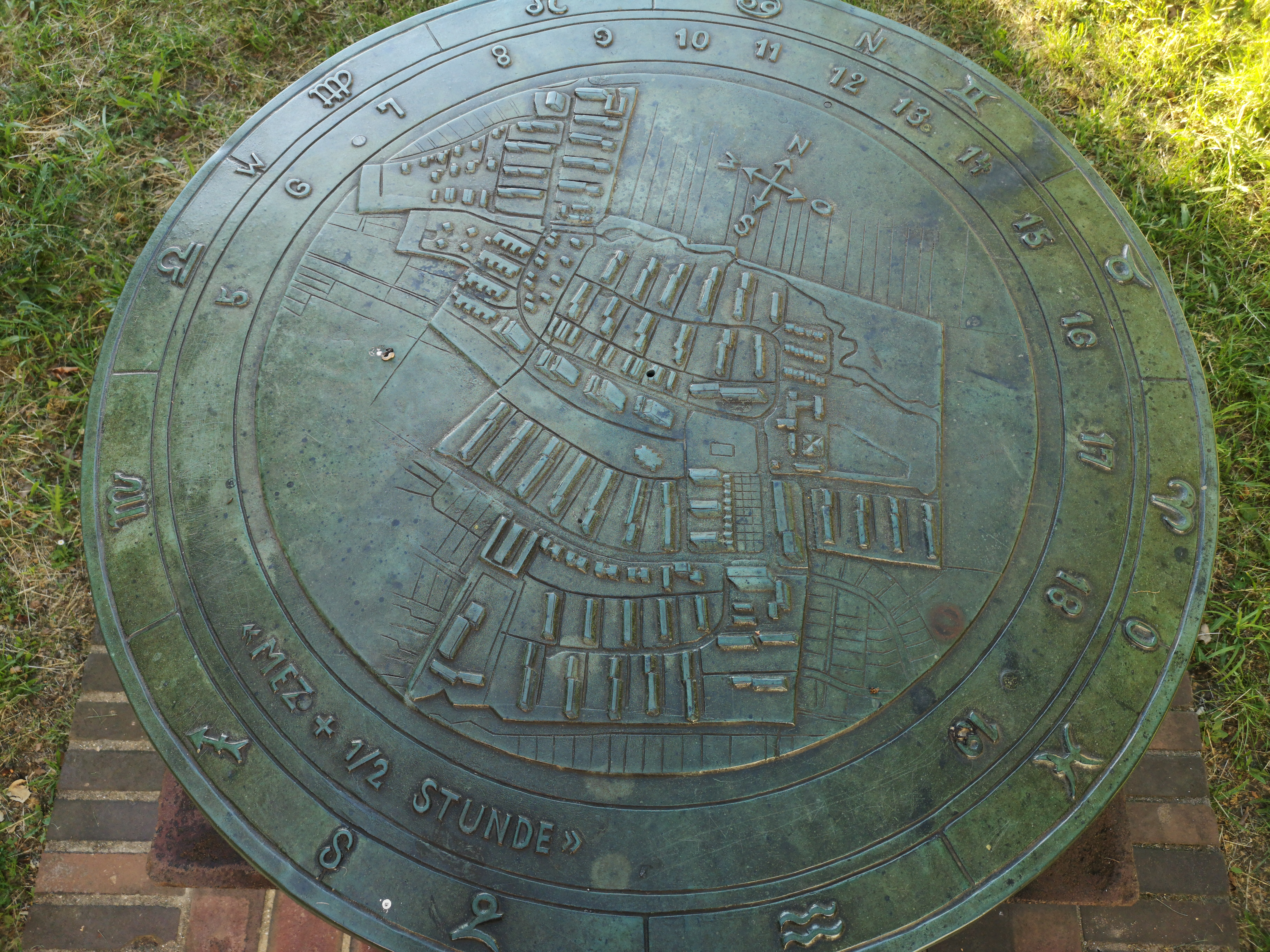 Lageplan auf dem Grundstein der Parksiedlung Kippekausen als Bronzeplatte